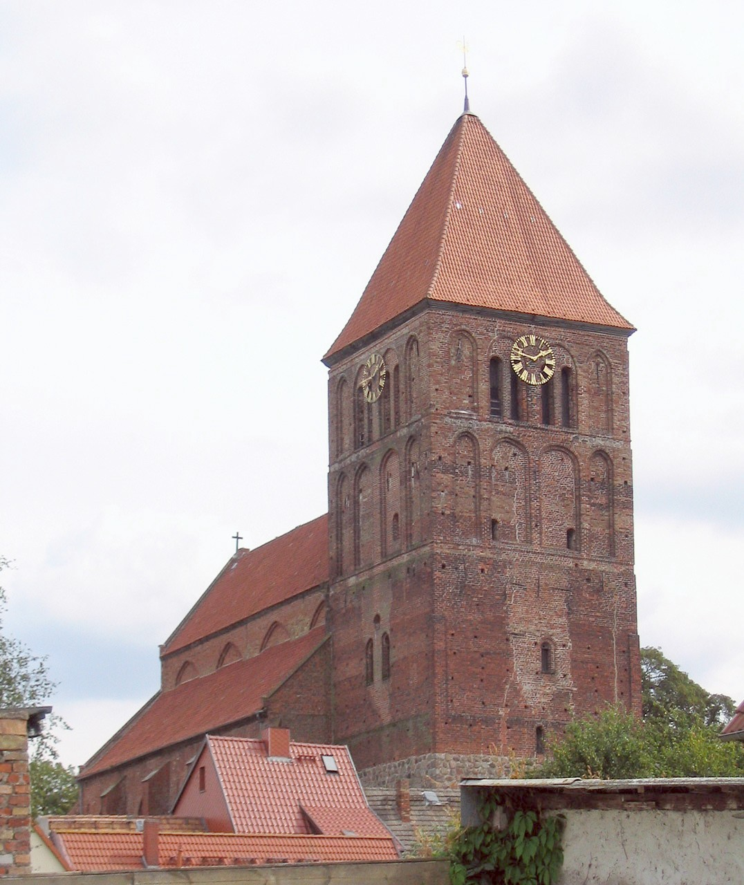 Beschreibung: Tribsees - Thomaskirche Fotograf: Darkone, 23. August 2004